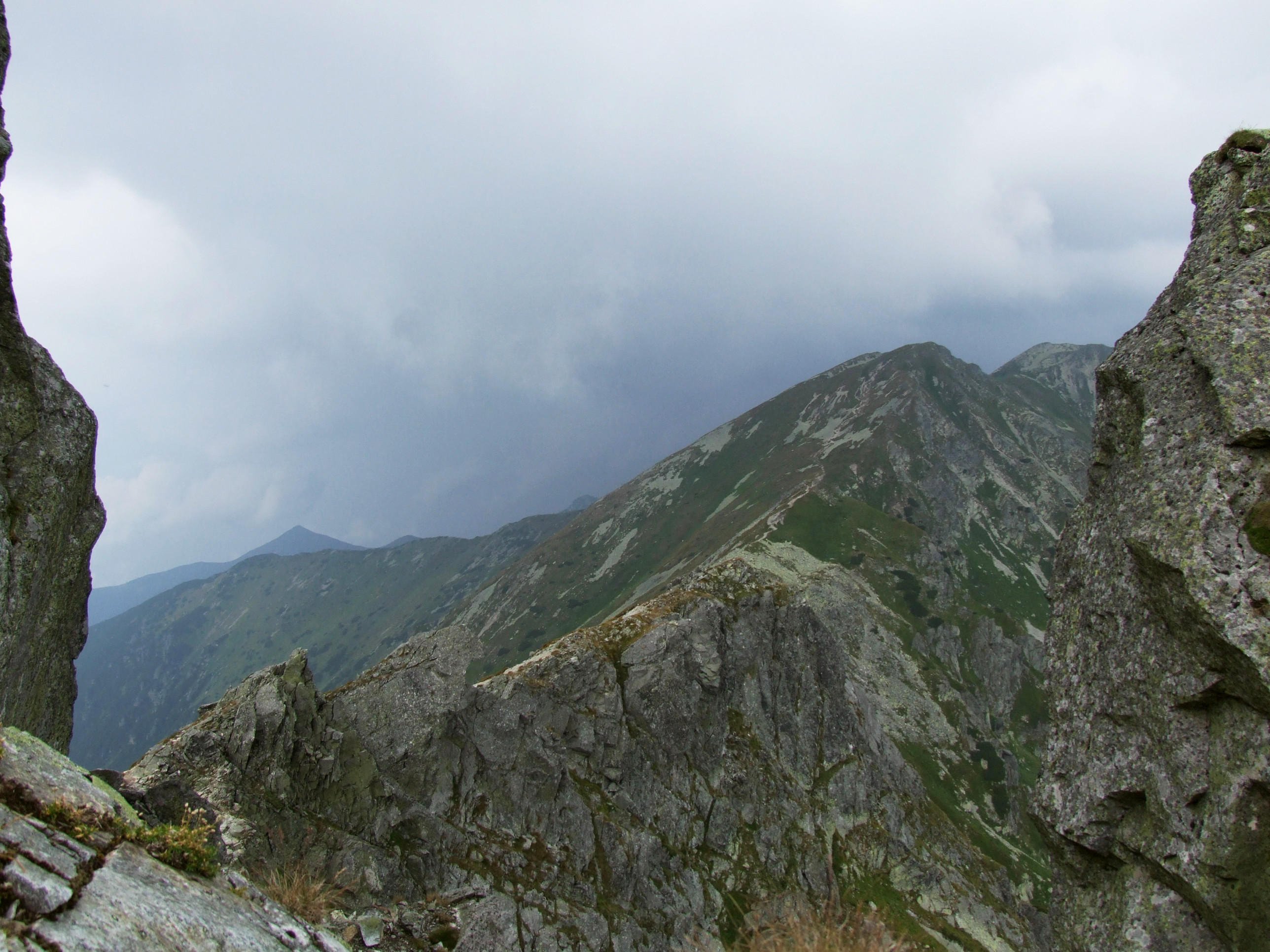 Skrzyniarki (West Tatra Mountains)